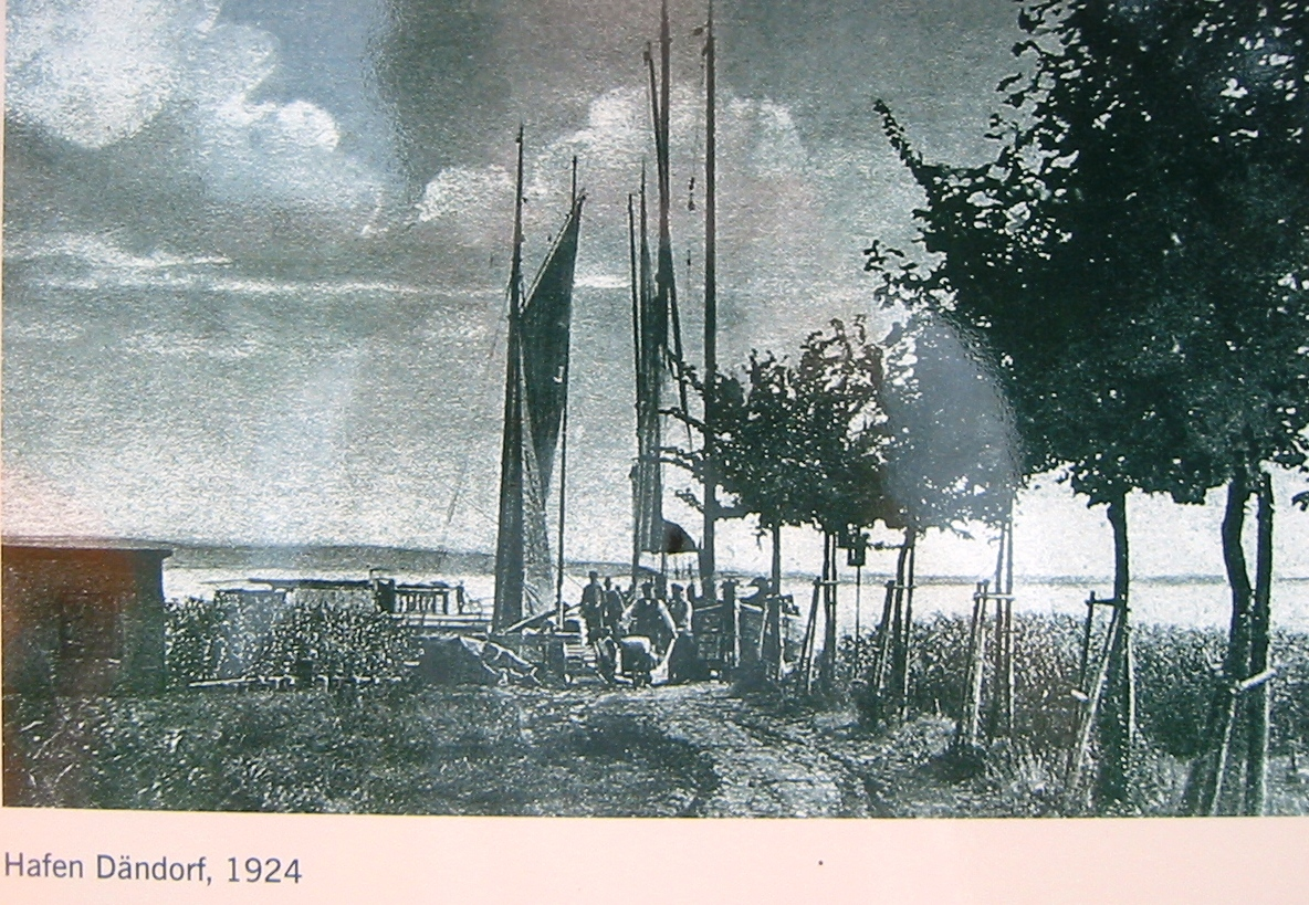 Aufnahme des Hafens in Dierhagen-Dändorf aus dem Jahr 1924. Das Foto ist auf einer Geschichtstafel am Hafen aufgedruckt.